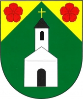 Lhotka (PR), znak. V zeleném štítě se zlatými kouty stříbrné průčelí kaple s černým vstupem a s věží. Věž stříbrná s černým obloukovým oknem a černou kuželovou střechou zakončenou zlatým křížkem. V koutech po červené růži.